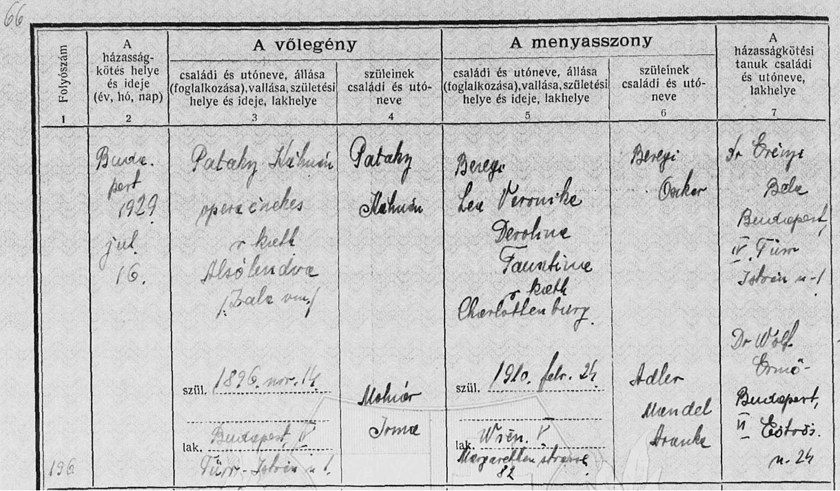 Pataky Kálmán operaénekes (1896-1964) és Beregi Lea (1910-1996) esküvője 1929-ben.